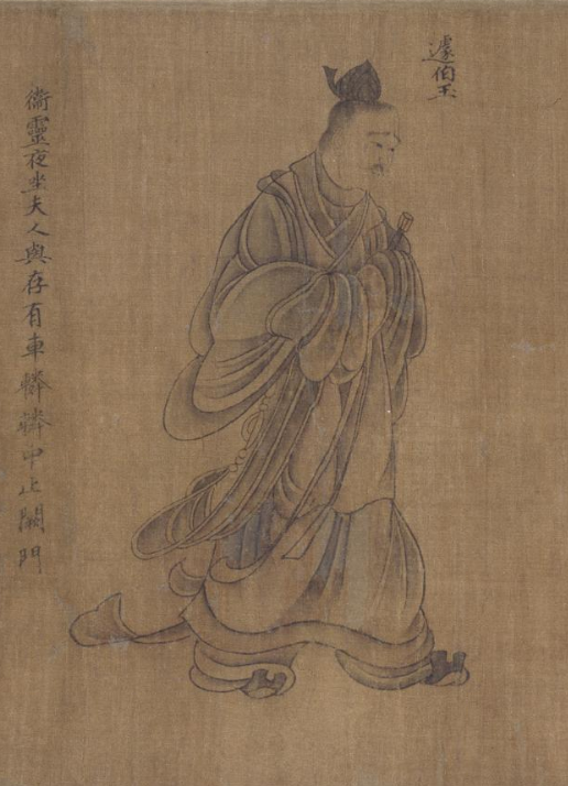 顧愷之《列女仁智圖》中的蘧伯玉